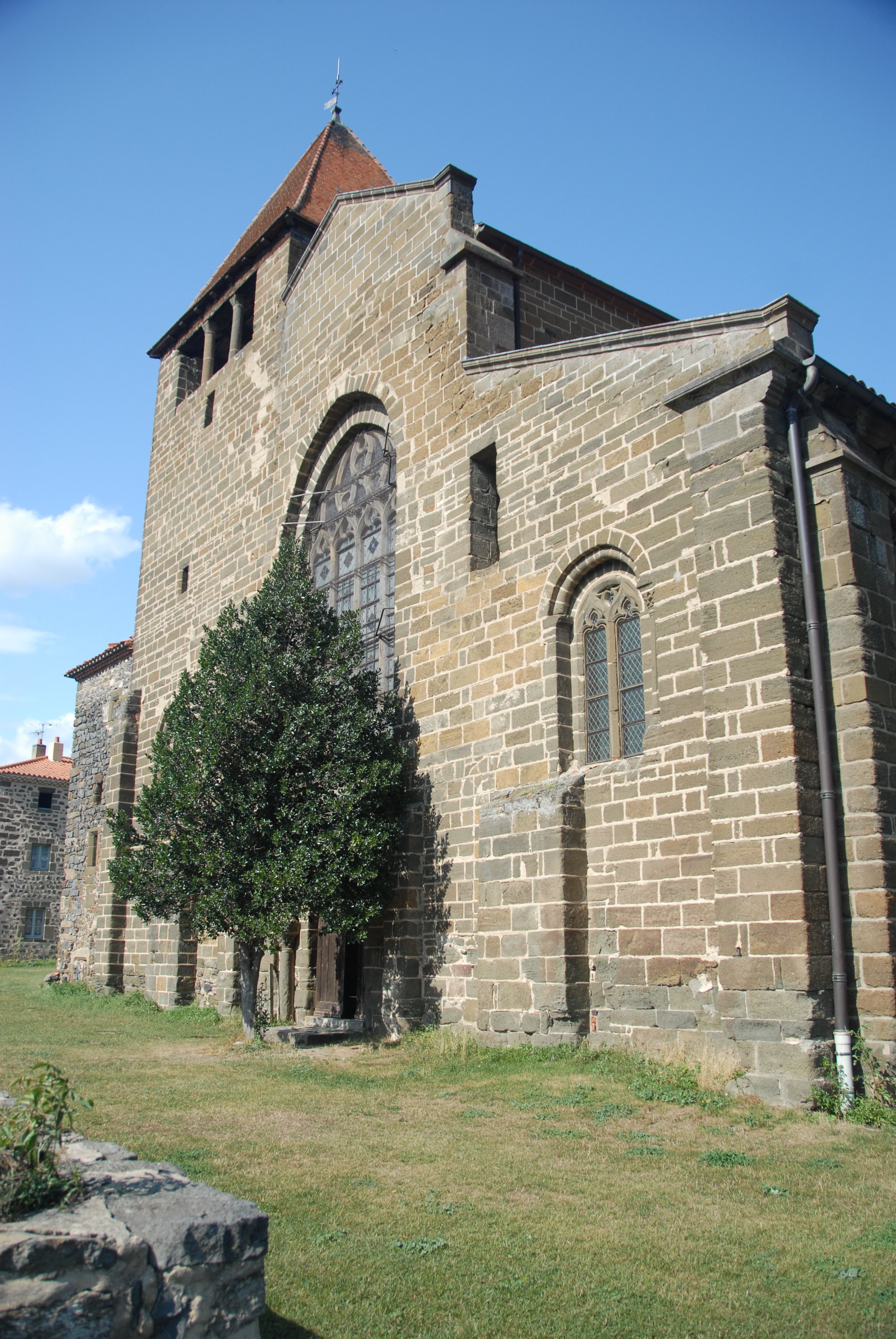 Chanteuges, Kirche, Fassade von SW